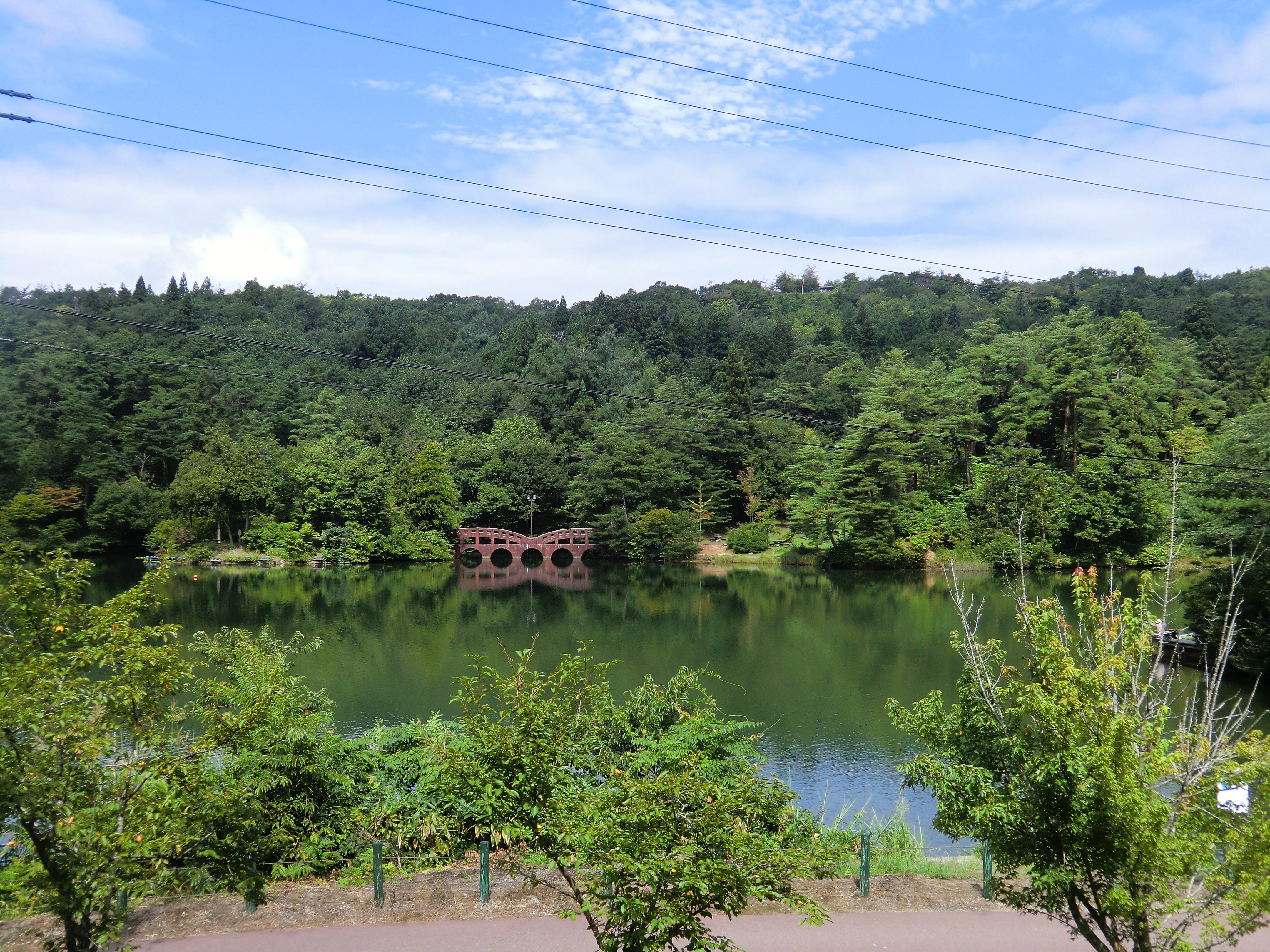 大平堤です。真ん中の赤い橋はやすらぎ橋です。